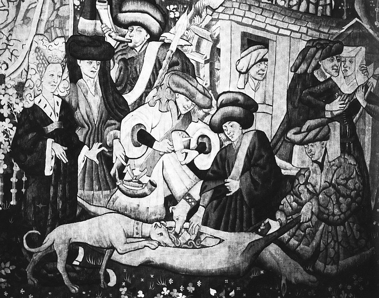 Fütterung von Jagdhunden, Gobelin, Mittelalter